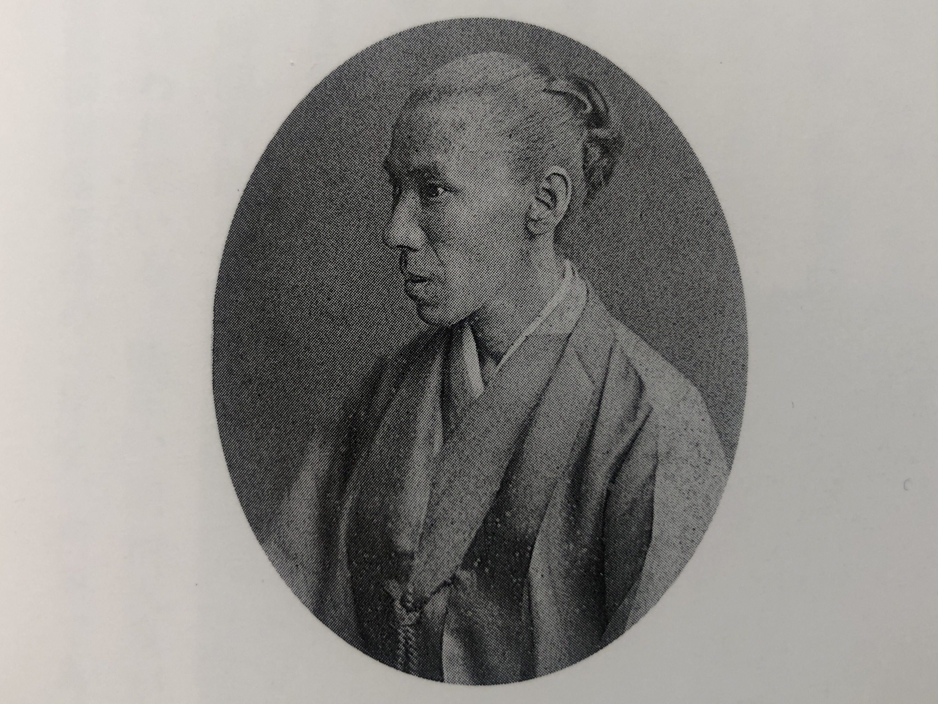 志野流家元16代目 蜂谷好古斎宗敬